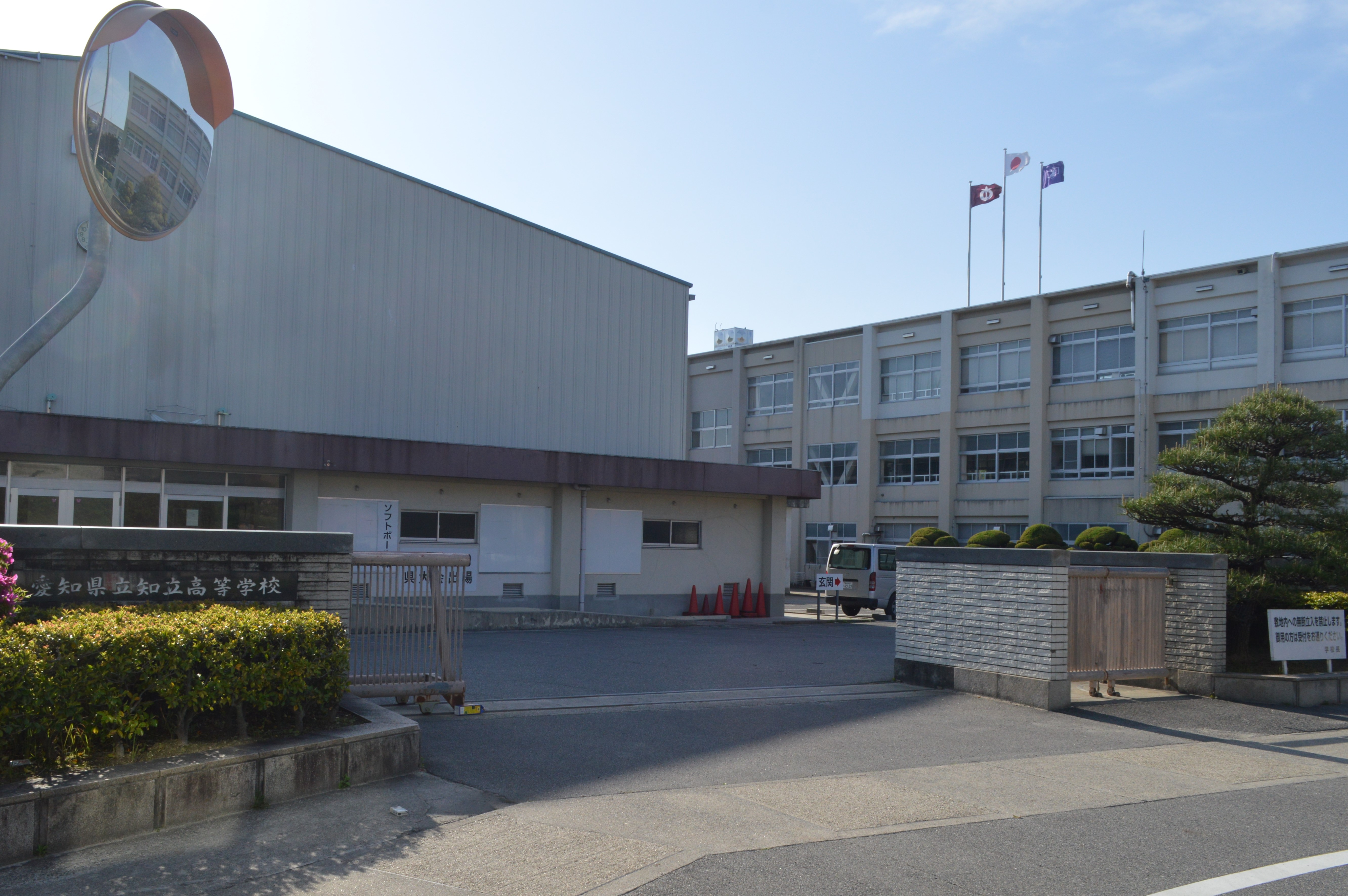 愛知県知立市にある愛知県立知立高等学校（愛知県立知立高校）。